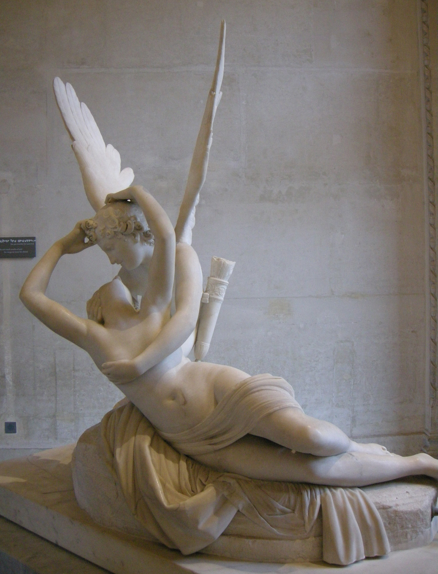 Antonio canova, amore e psiche louvre 09.JPG